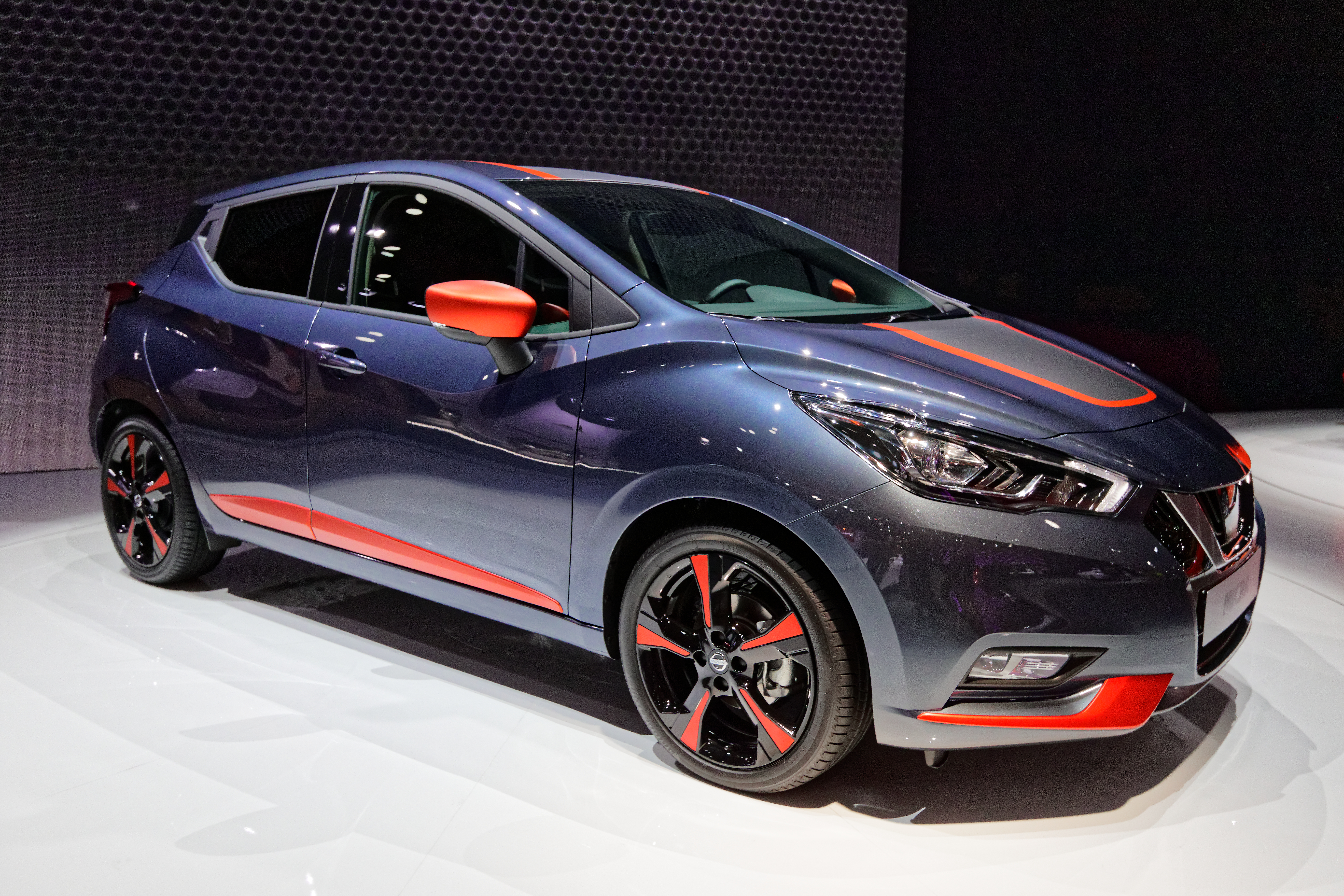 Une Nissan Micra présentée lors du mondial de l'automobile de Paris 2016.